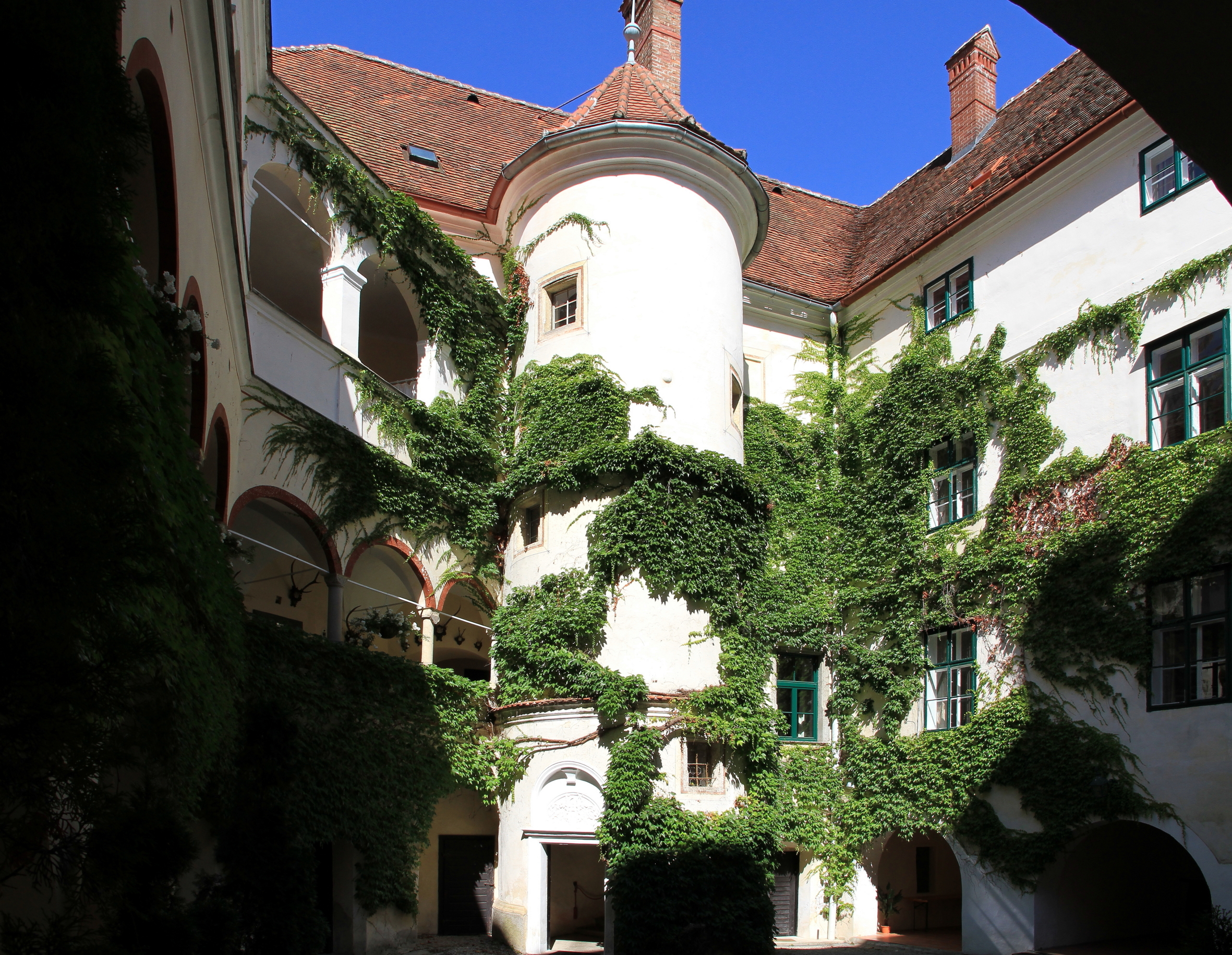 Arkadenhof mit vortretendem Treppenrundturm des Schlosses Ernegg in der niederösterreichischen Gemeinde Steinakirchen am Forst.